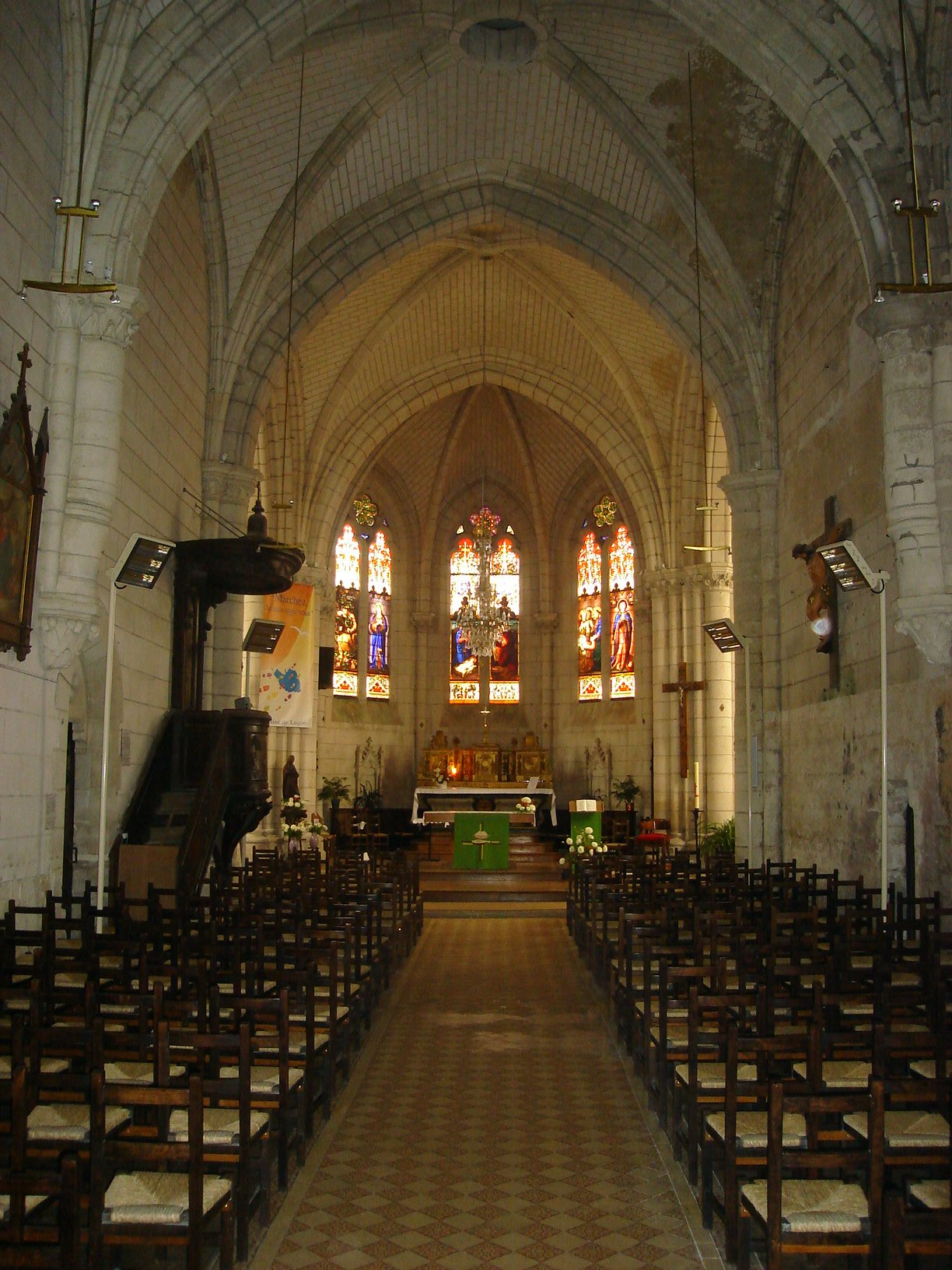 Église de la Nativité-de-Notre-Dame de L'Hermenault, (Inscrit, 1984) .